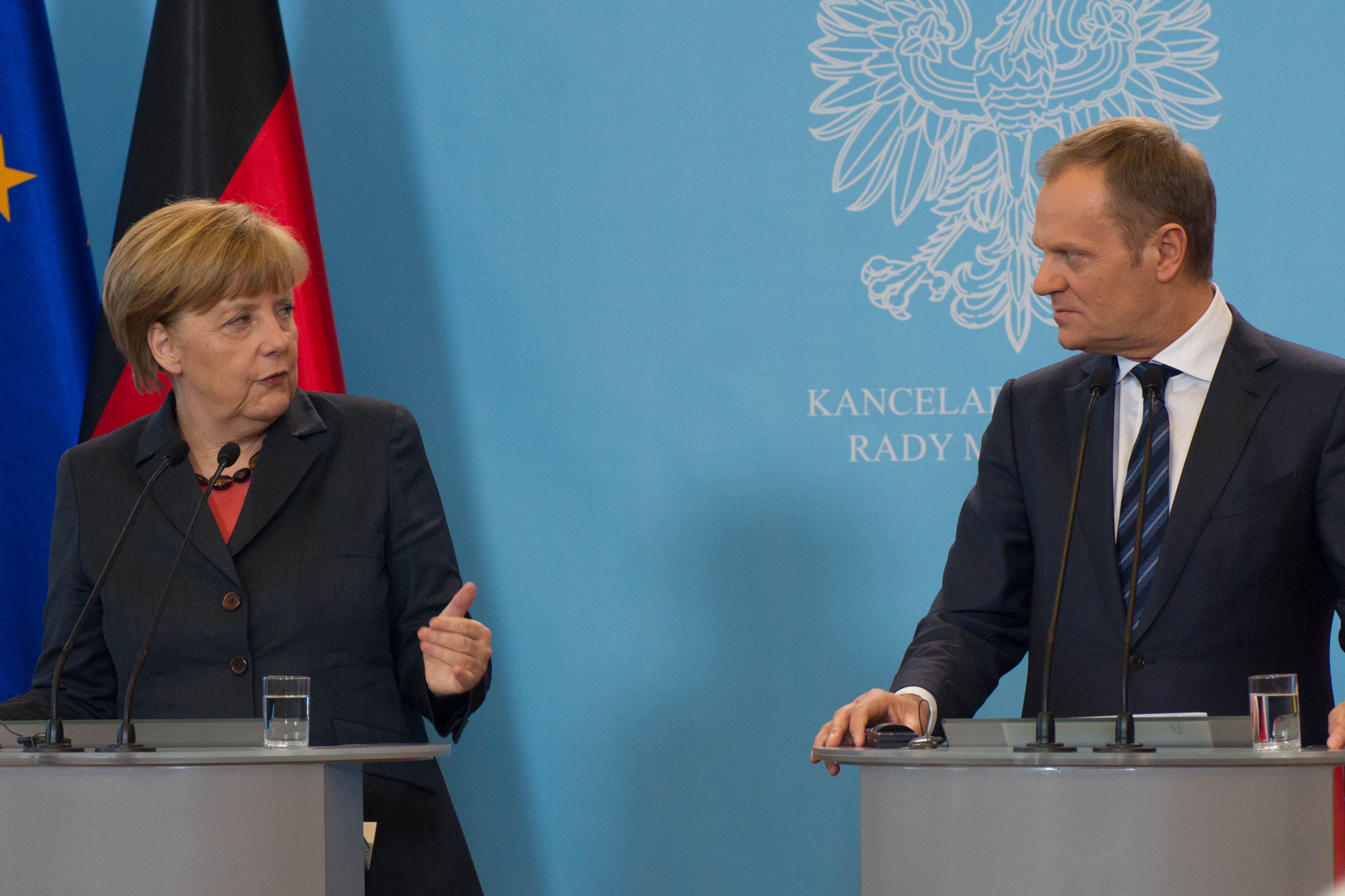 Spotkanie Tusk-Merkel 12.03.2014